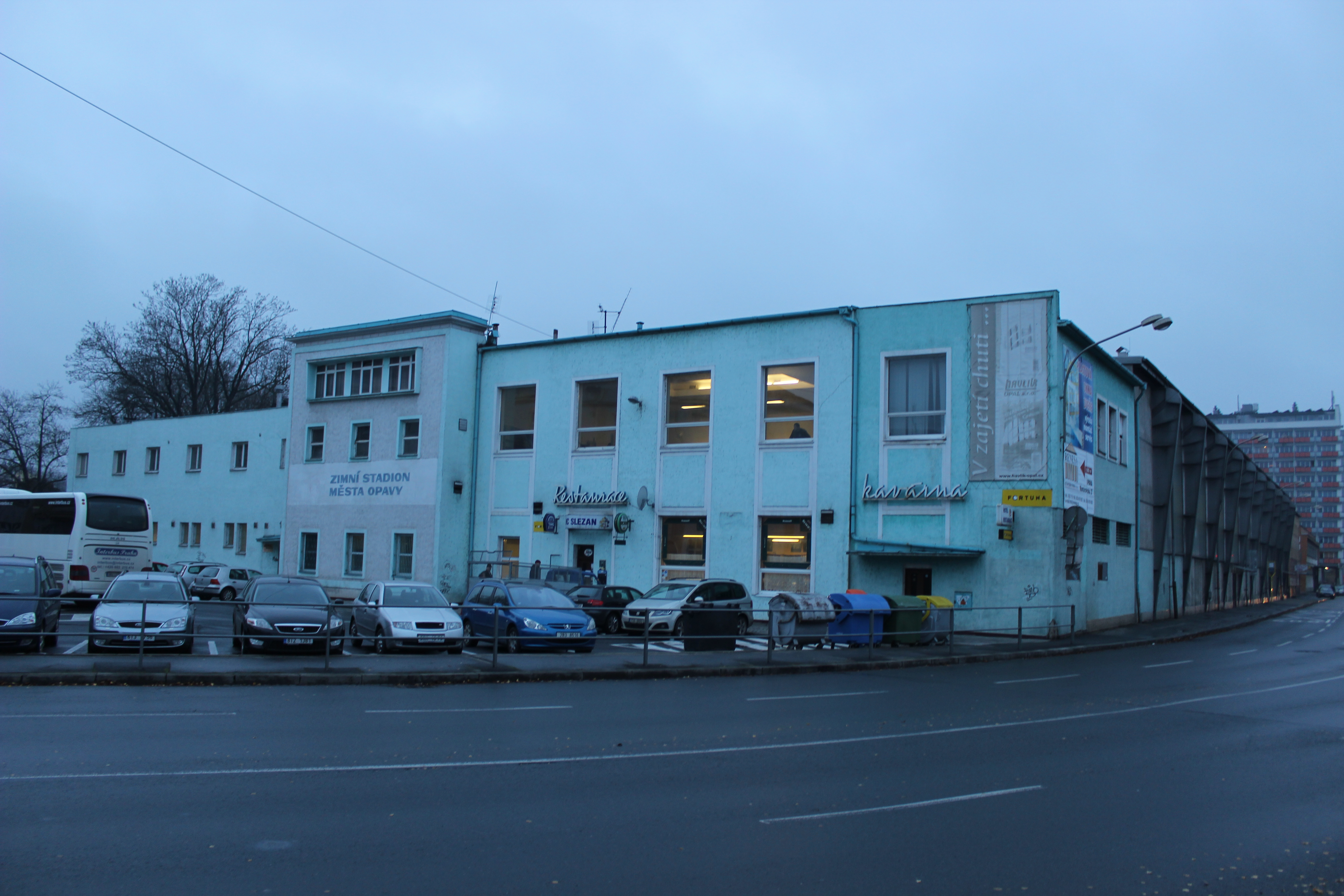 Zimní stadion v Opavě (pohled od východu).